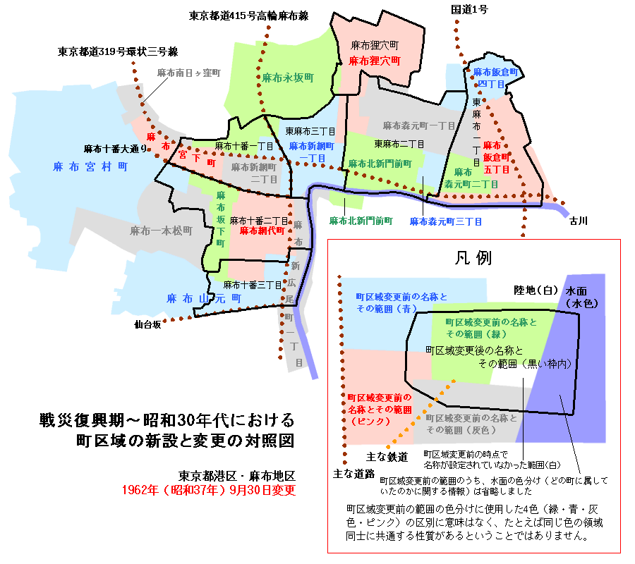 町区域の新設と変更の対照図 東京都港区・麻布地区